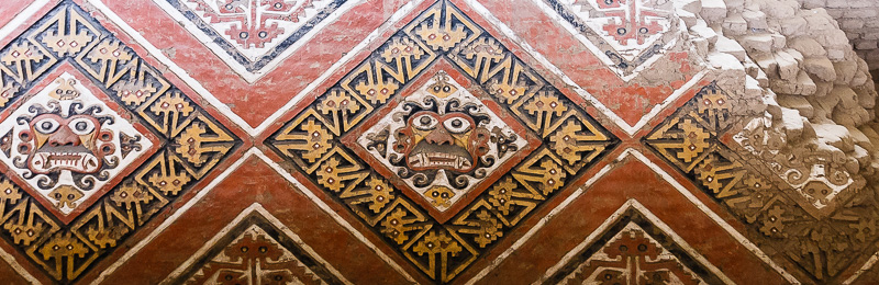 Huaca de la Luna, Trujillo, Perú. © Enrique Jara